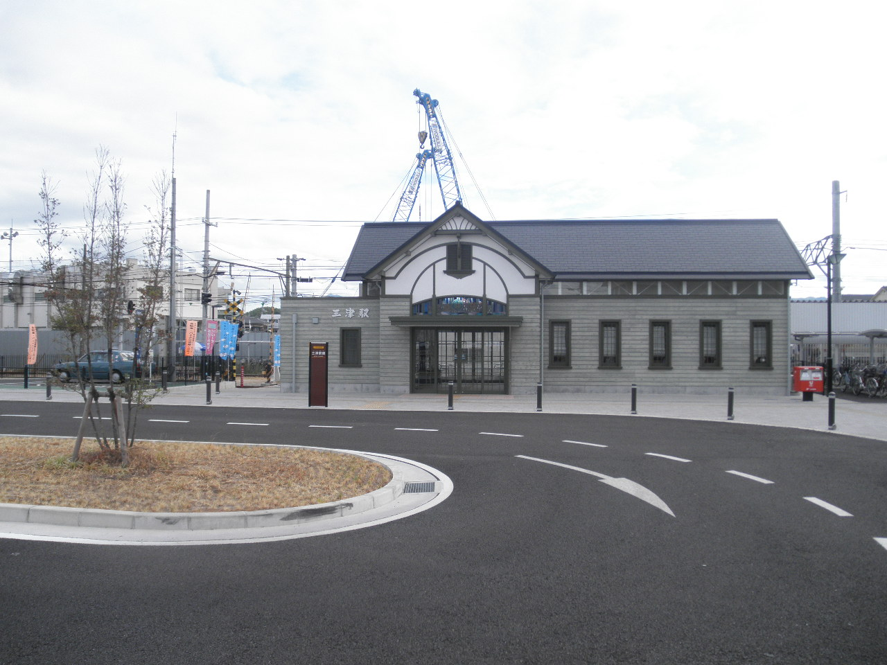 伊予鉄道高浜線三津駅